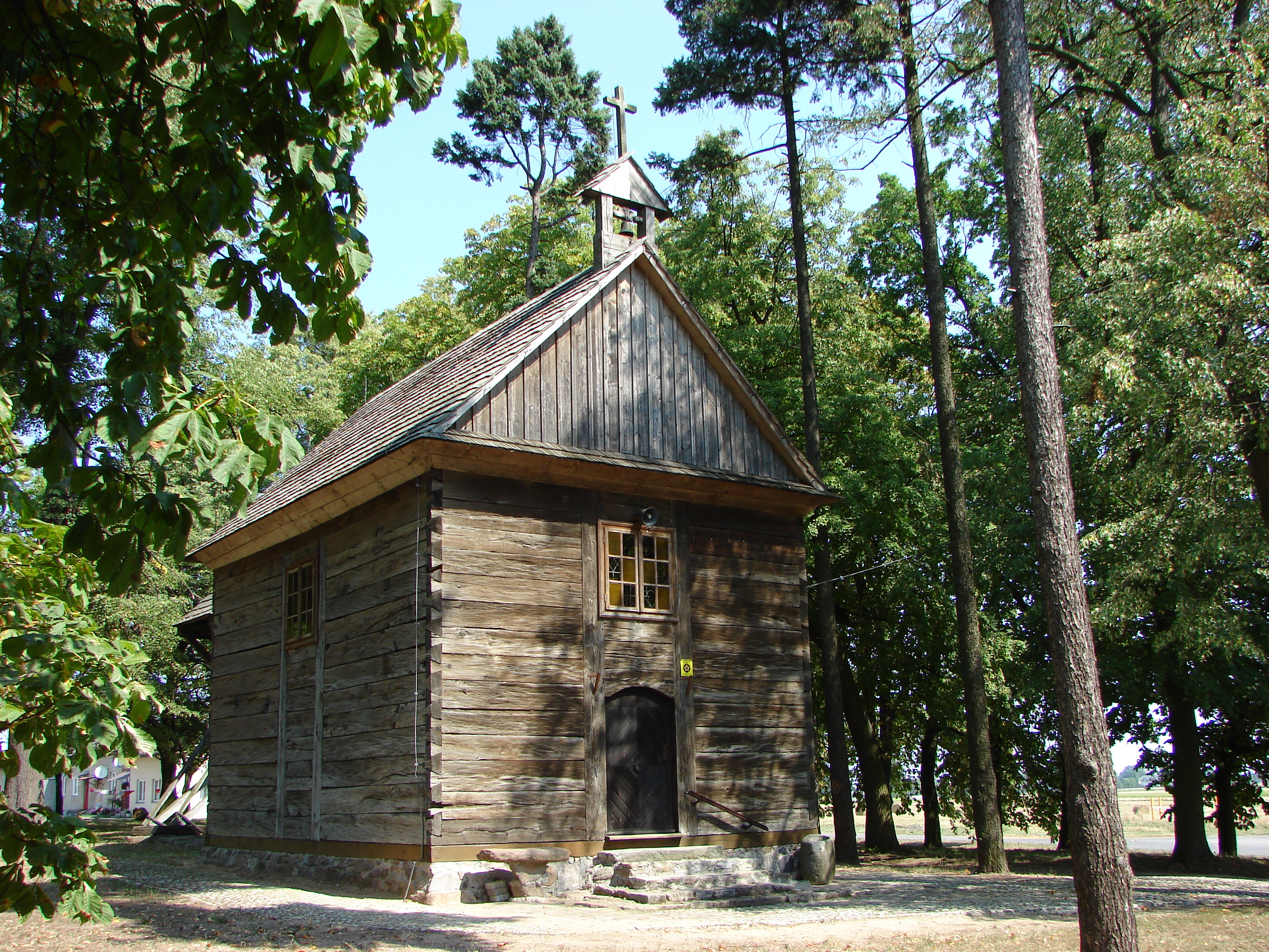 Stary Sławoszew, kościół